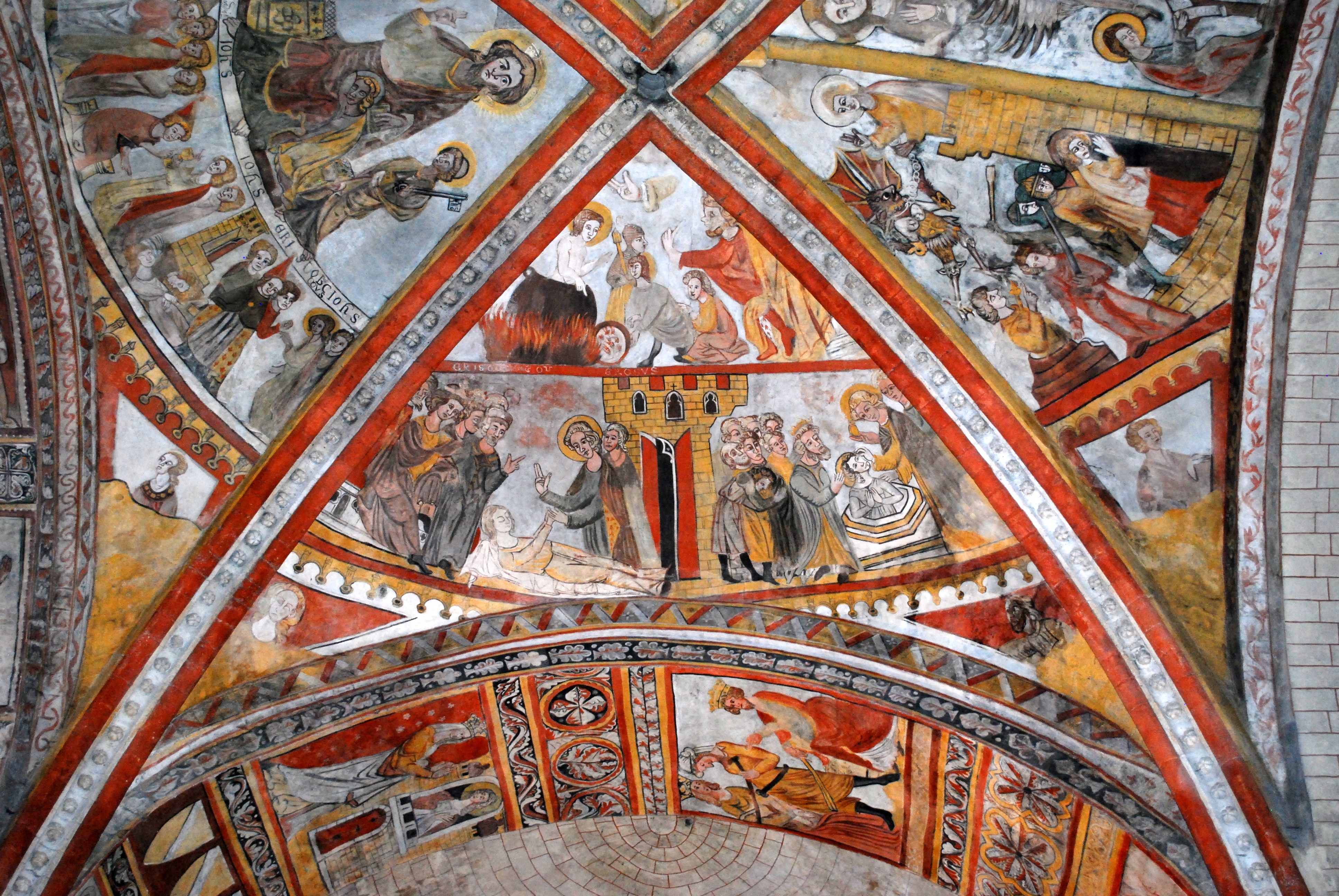 Saint-Macaire église peintures gothiques